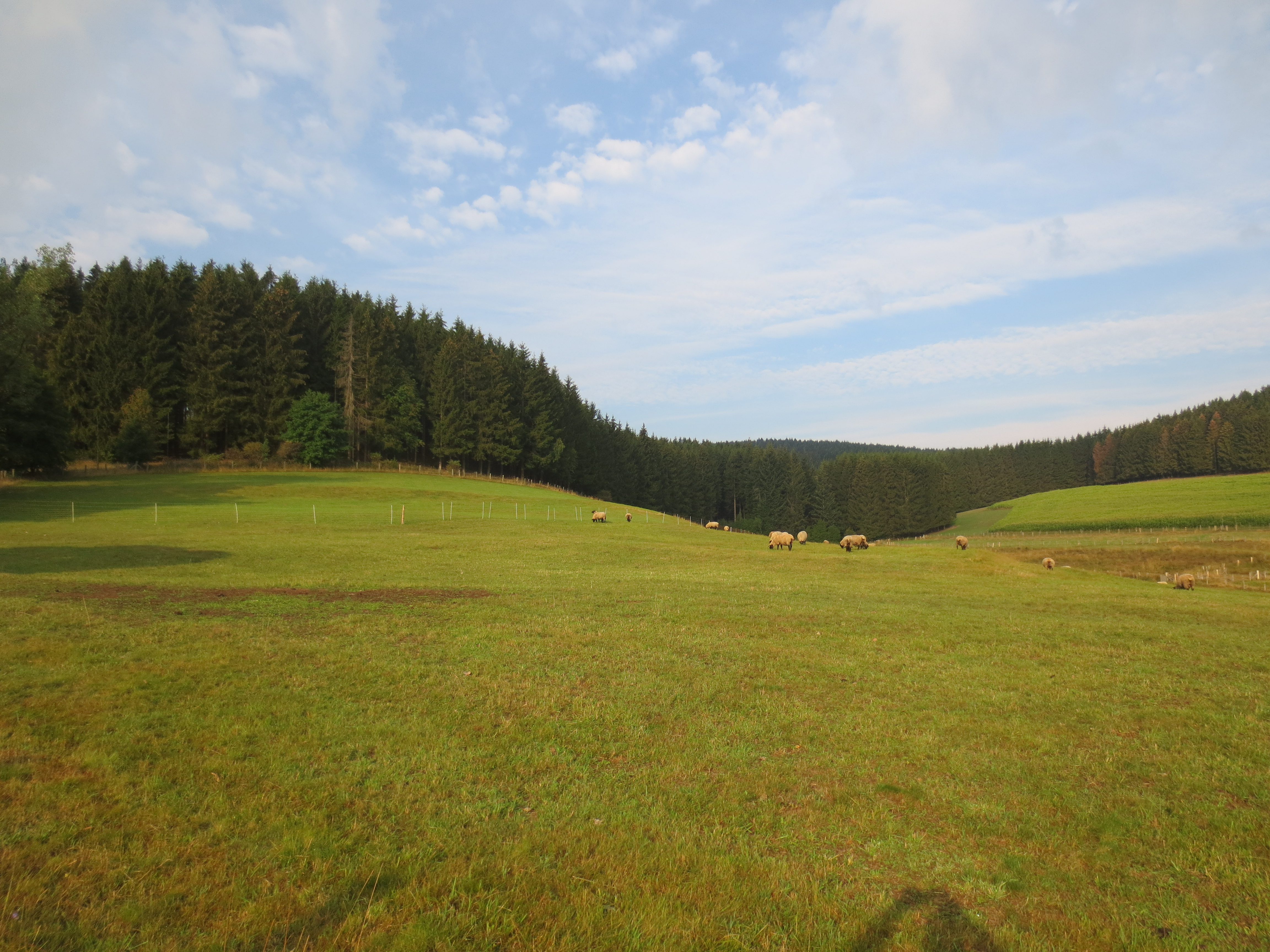 Gemarkung und Wüstung Hackenbracht, rechts der linksseitige Zufluss der Benfe, die "Hackenbracht".